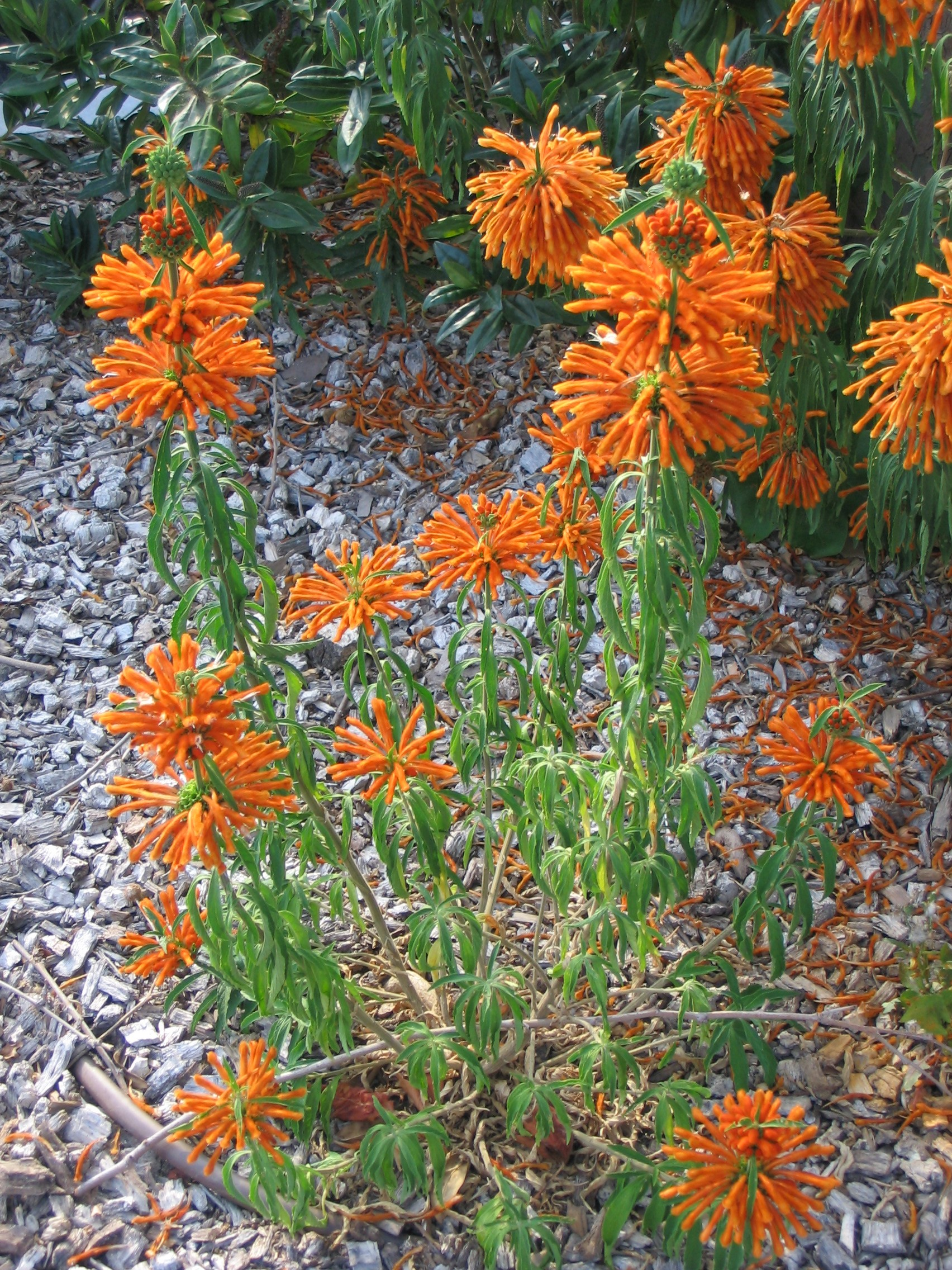 Queue de lion, Leonotis leonurus (famille des Lamiaceae). Port de Bormes-les-Mimosas - La Favière